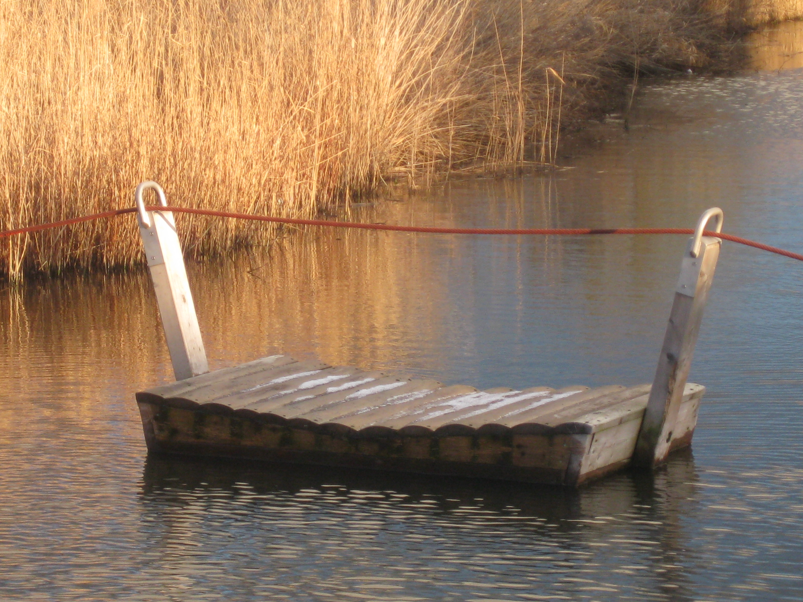 Trekpontje in Cultuurpark De Lange Bretten